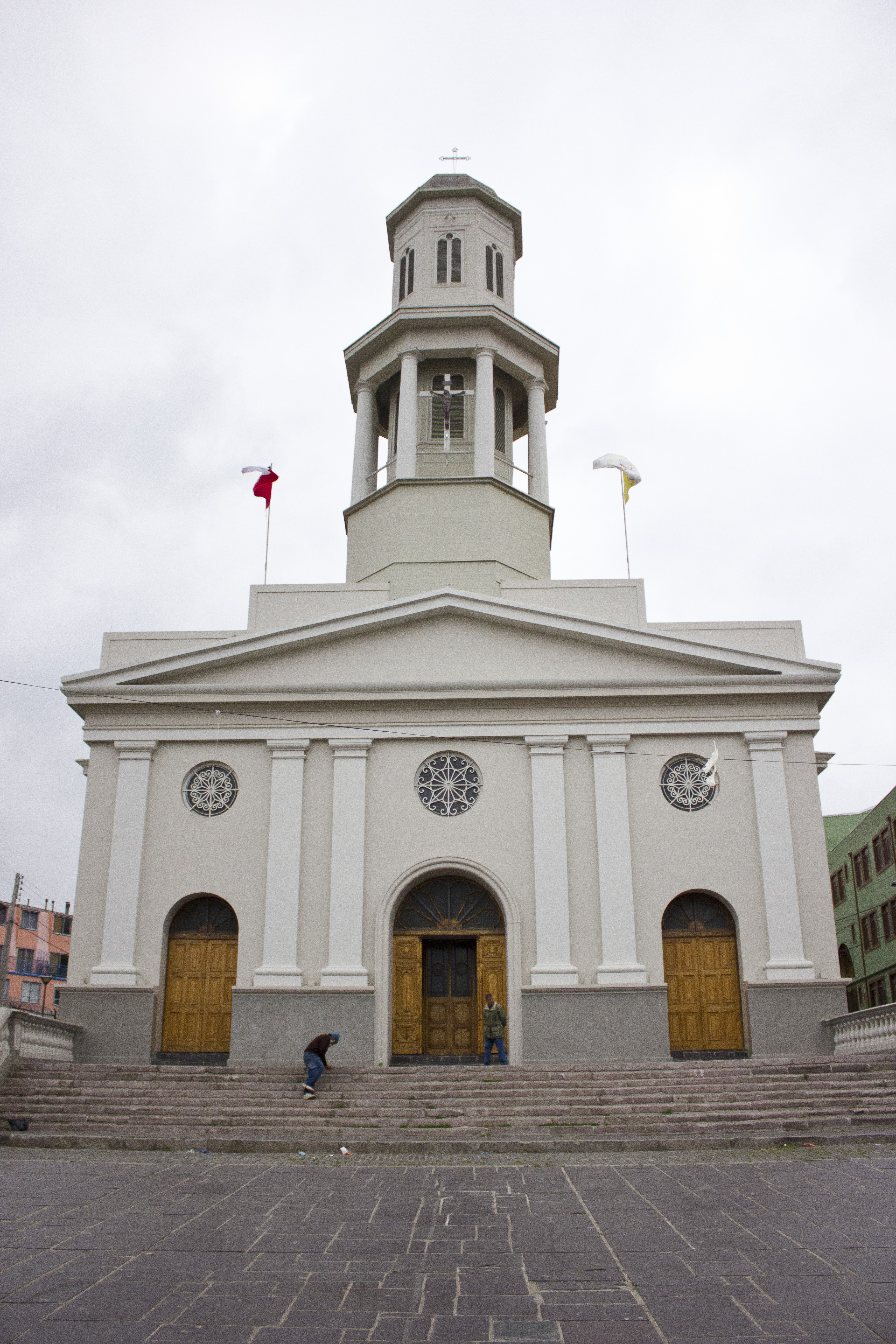 Entorno Iglesia La Matriz This is a photo of a national monument in Chile: 788